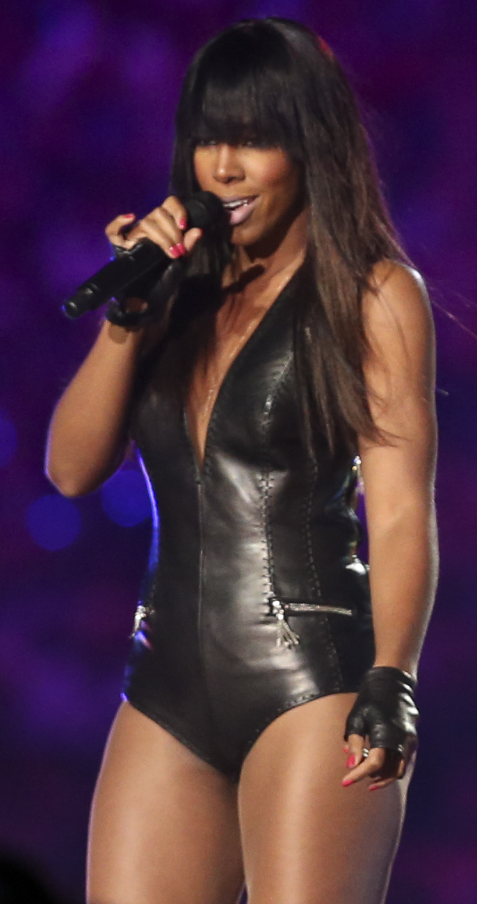 DW2Q0666